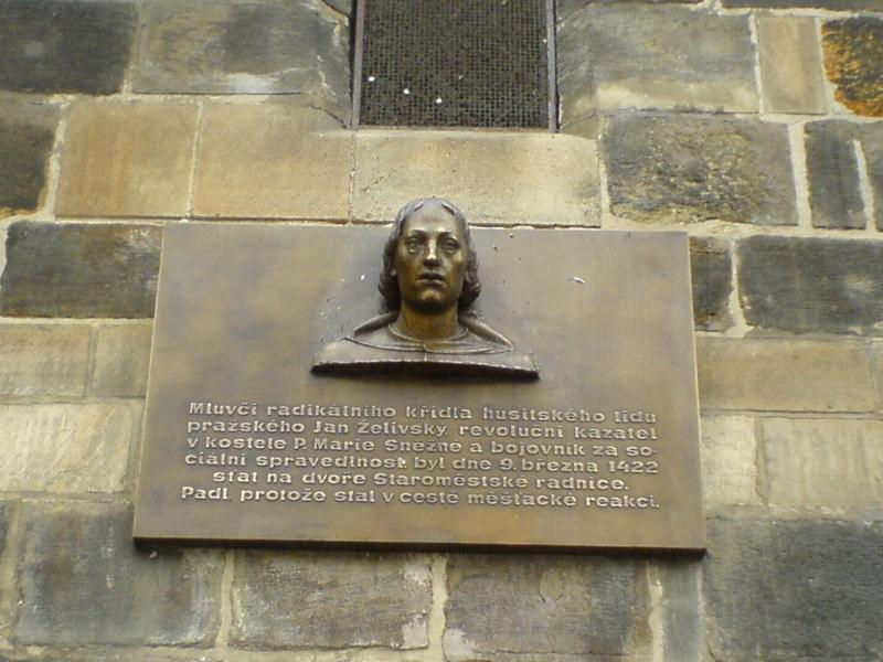 Pamětní deska Jan Želivský, na Staroměstském náměstí v Praze